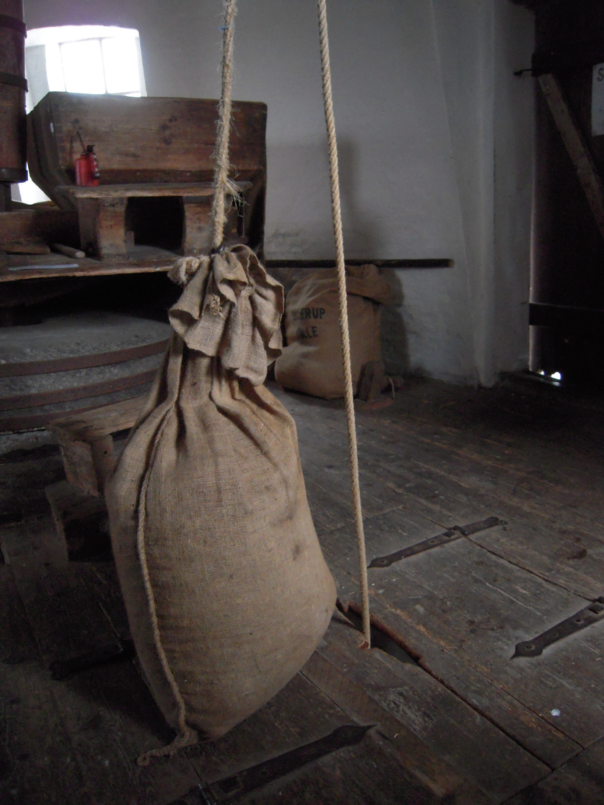 Hejs til sække på Sillerup Mølle ved Haderslev